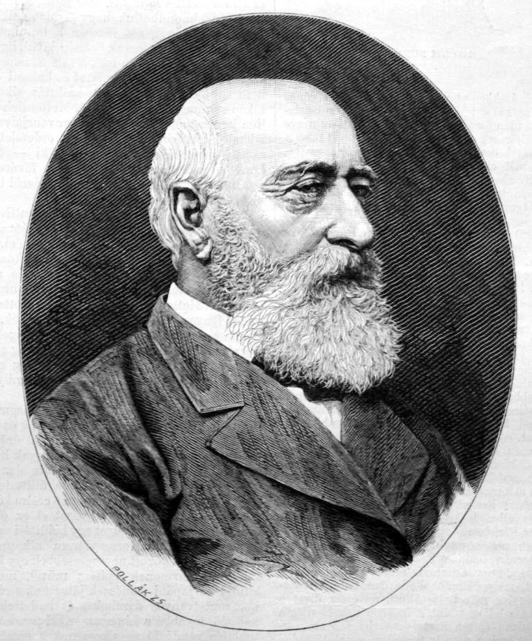 Teleki Sándor (1821–1892) honvéd ezredes, Garibaldi önkéntese, olasz királyi ezredes, emlékiratíró portréja. Pollák Zsigmond metszete